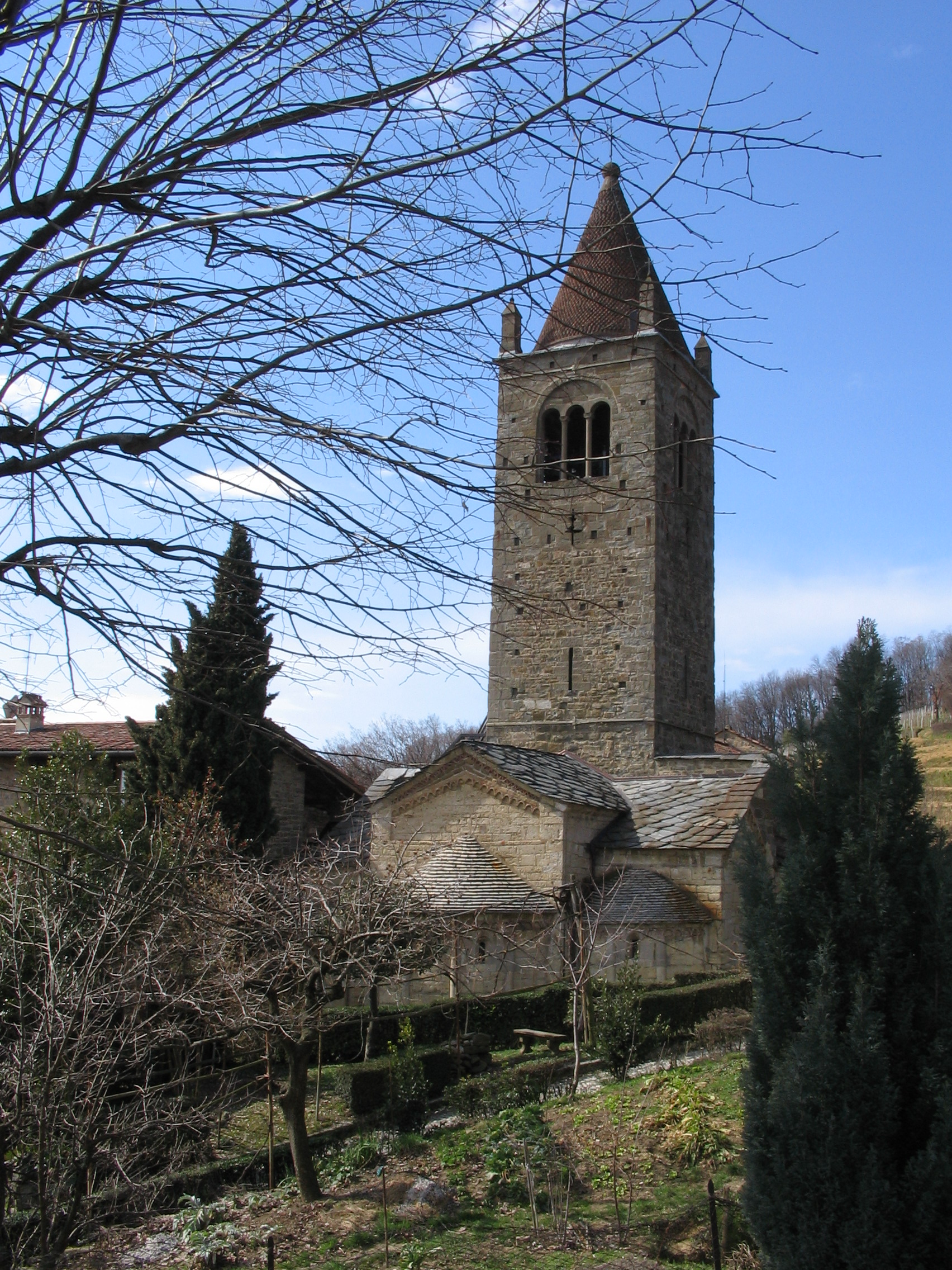 Autore Giorces. Abbazia di Sant'Egidio parte posteriore.